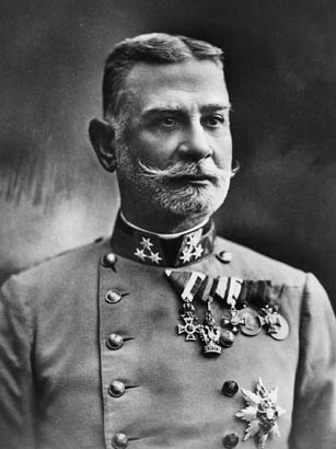 Il generale austro-ungarico Liborius Ritter von Frank, comandante della Quinta armata austro-ungarica all'inizio della prima guerra mondiale